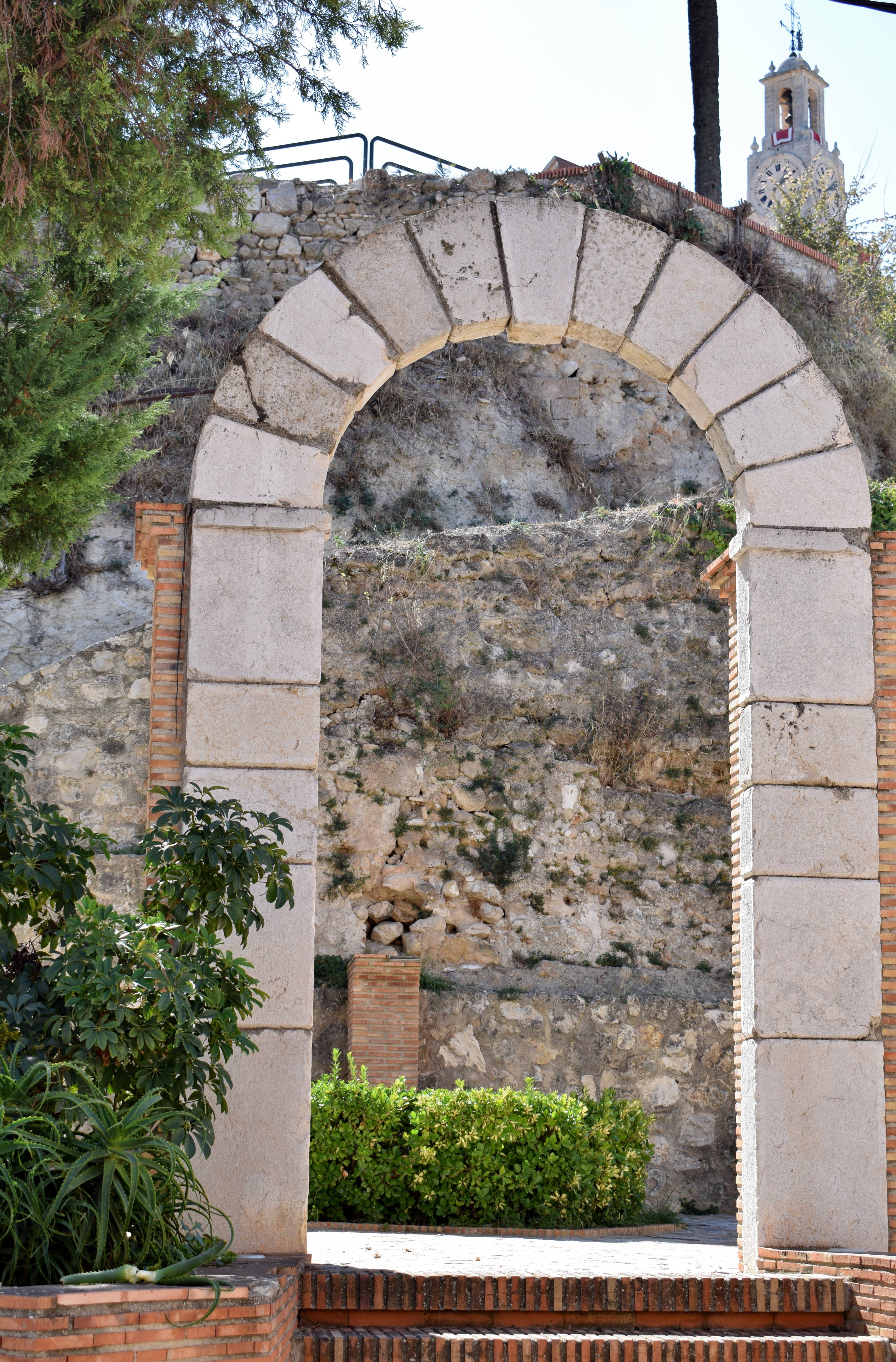 Albaida.